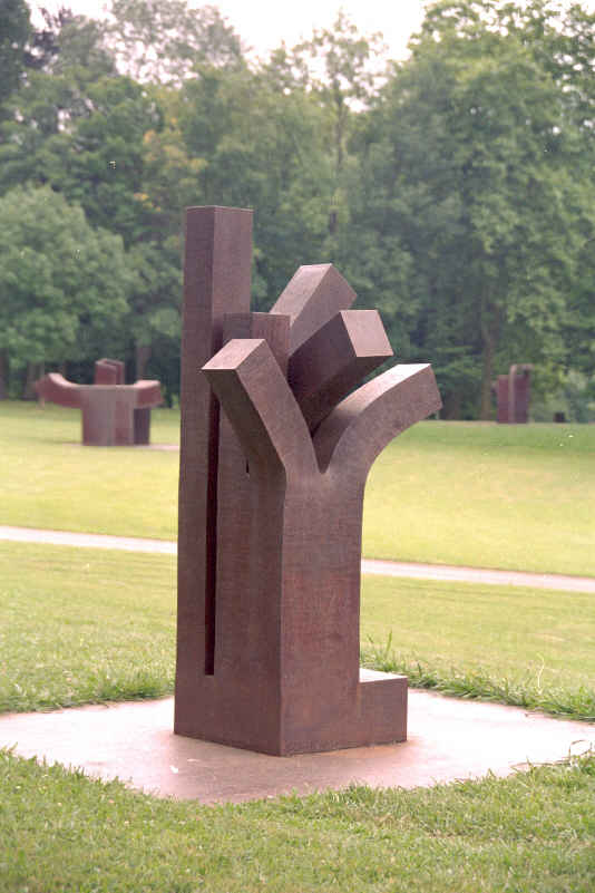 Zona de jardines de Chillida-Leku, museo del genial escultor Eduardo Chillida en Hernani, provincia de Guipúzcoa (España). Tomada por JMSE el 7 de julio de 2003 y cedida a Wikipedia. Categoría: España (imagen) Categoría: Escultura (imagen)